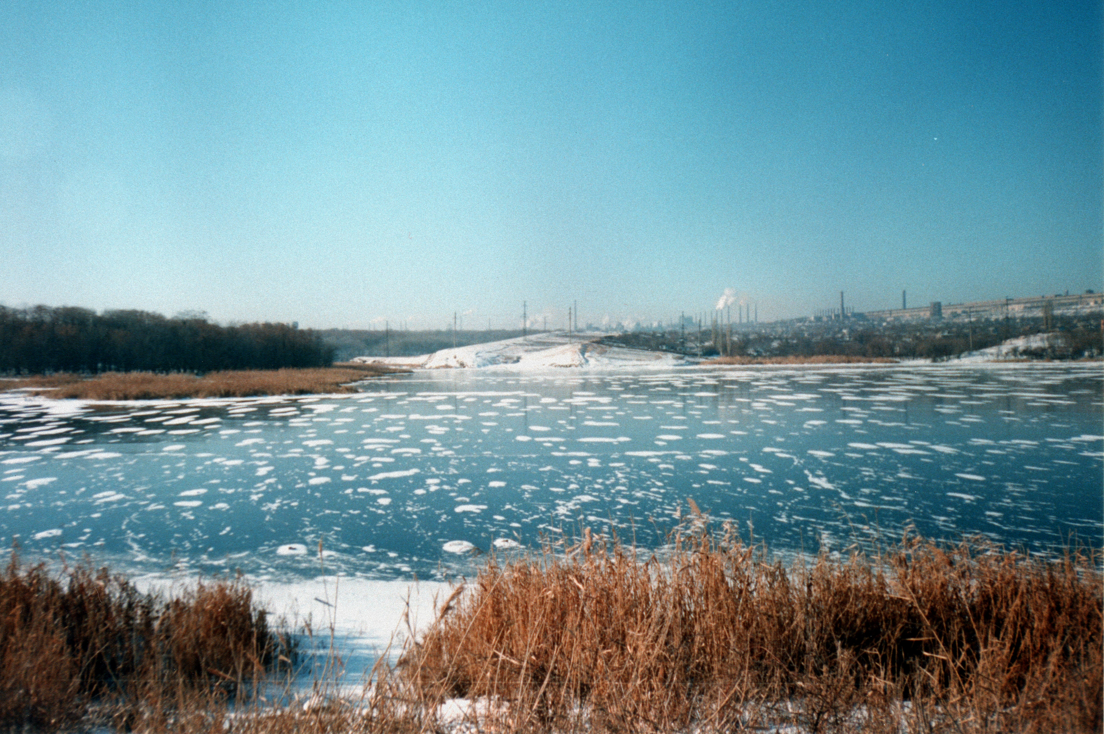 Алчевск, Луганская область, Украина